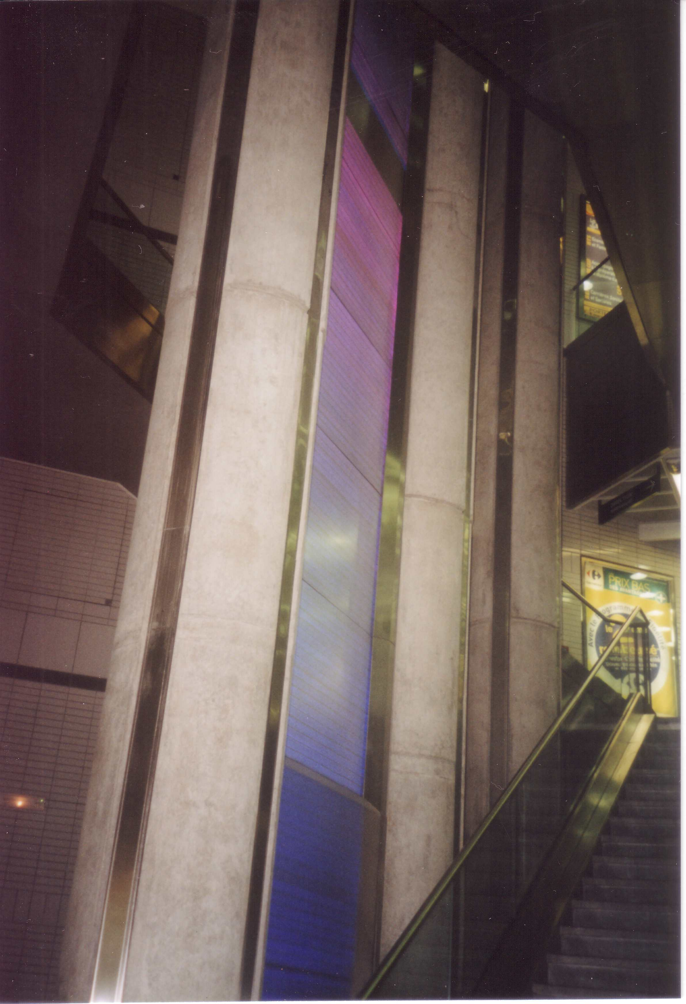 L'œuvre d'art par Ange Leccia de la station de métro Compans Caffarelli, ligne B, Toulouse.